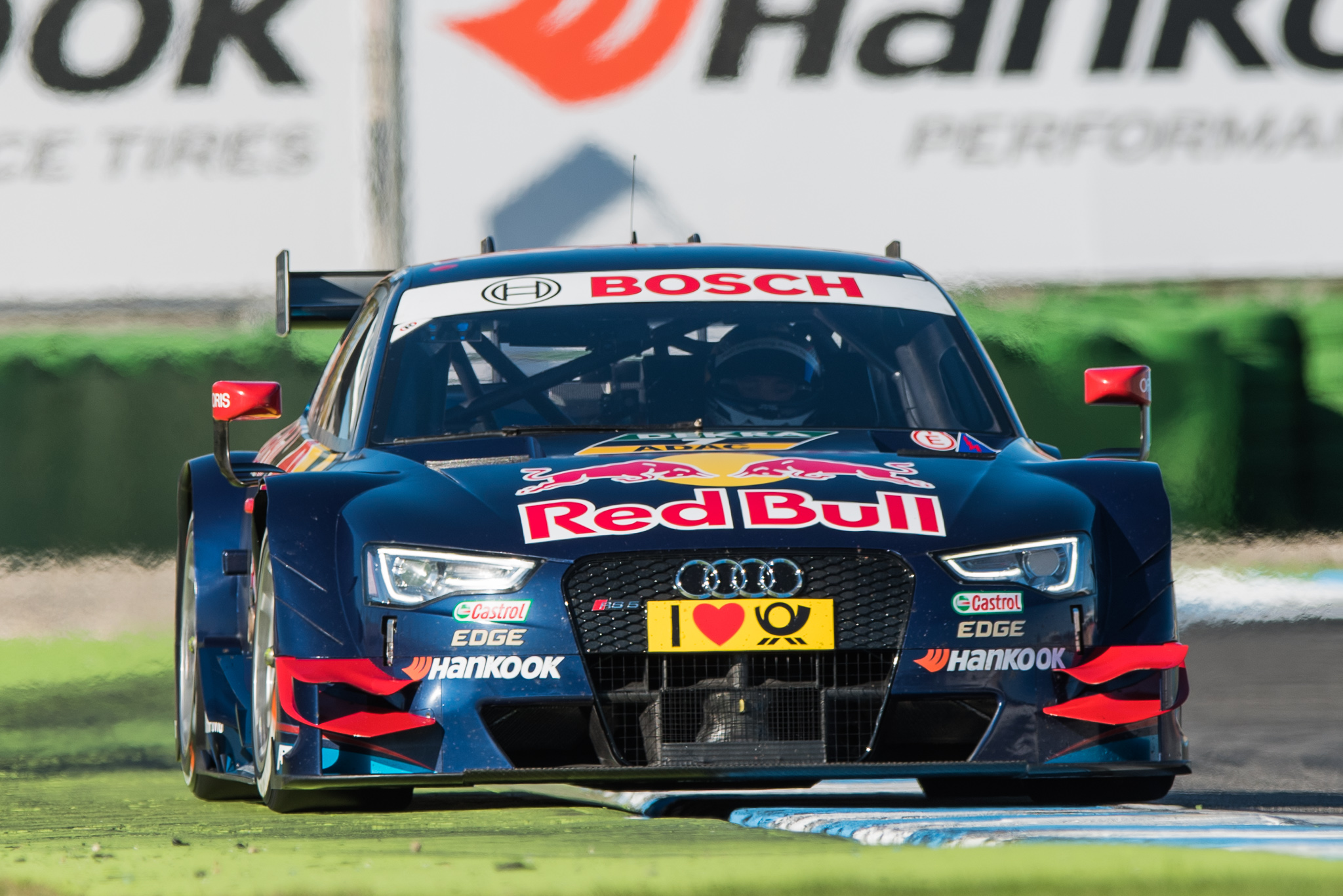 Abt Sportsline GmbH,DTM,Deutsche Tourenwagen Masters,Hockenheimring,Mattias Ekström,Motorsport,Red Bull Audi RS 5 DTM